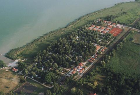 Balatongyörök- Hungary